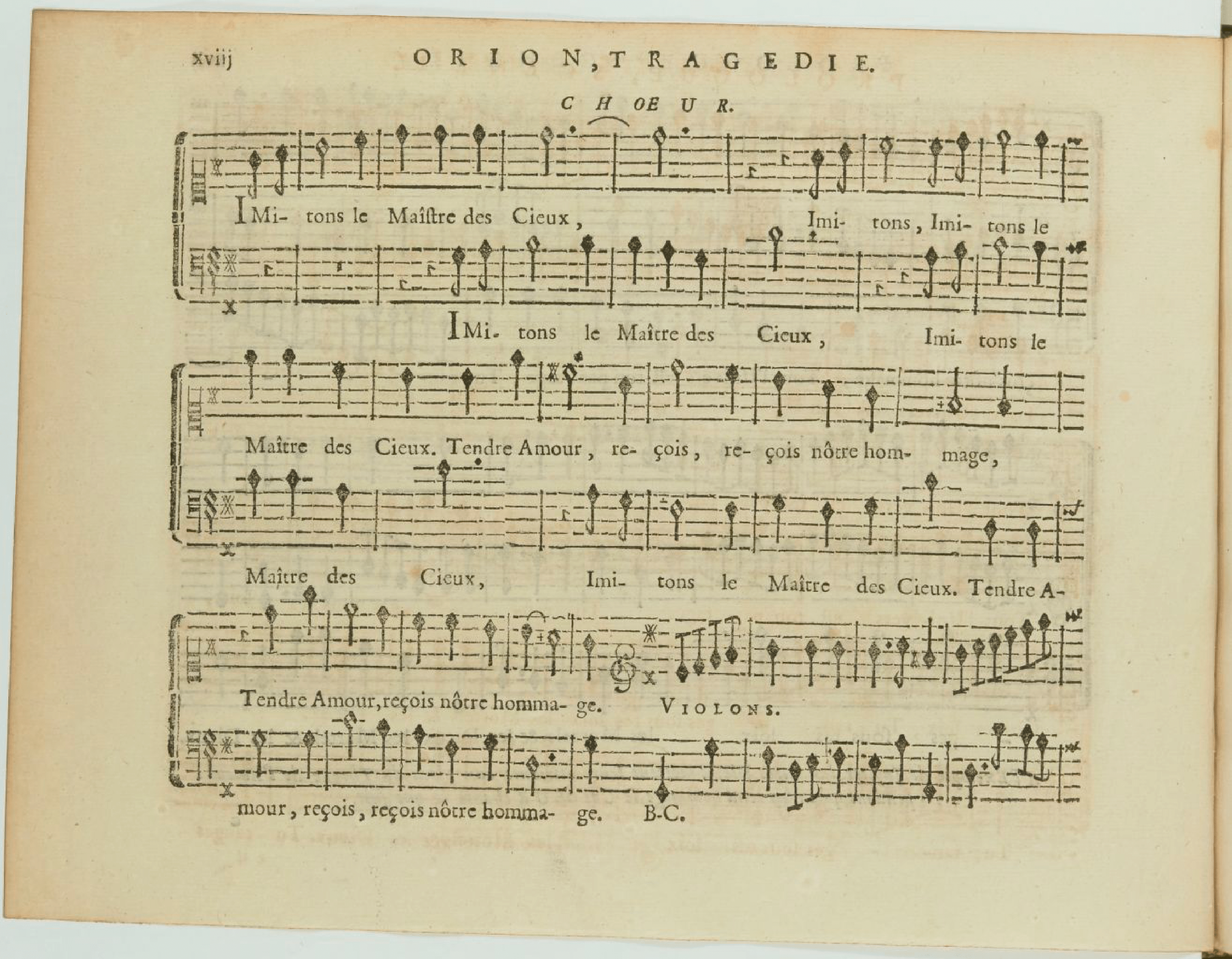 Imitons le Maistre des Cieux